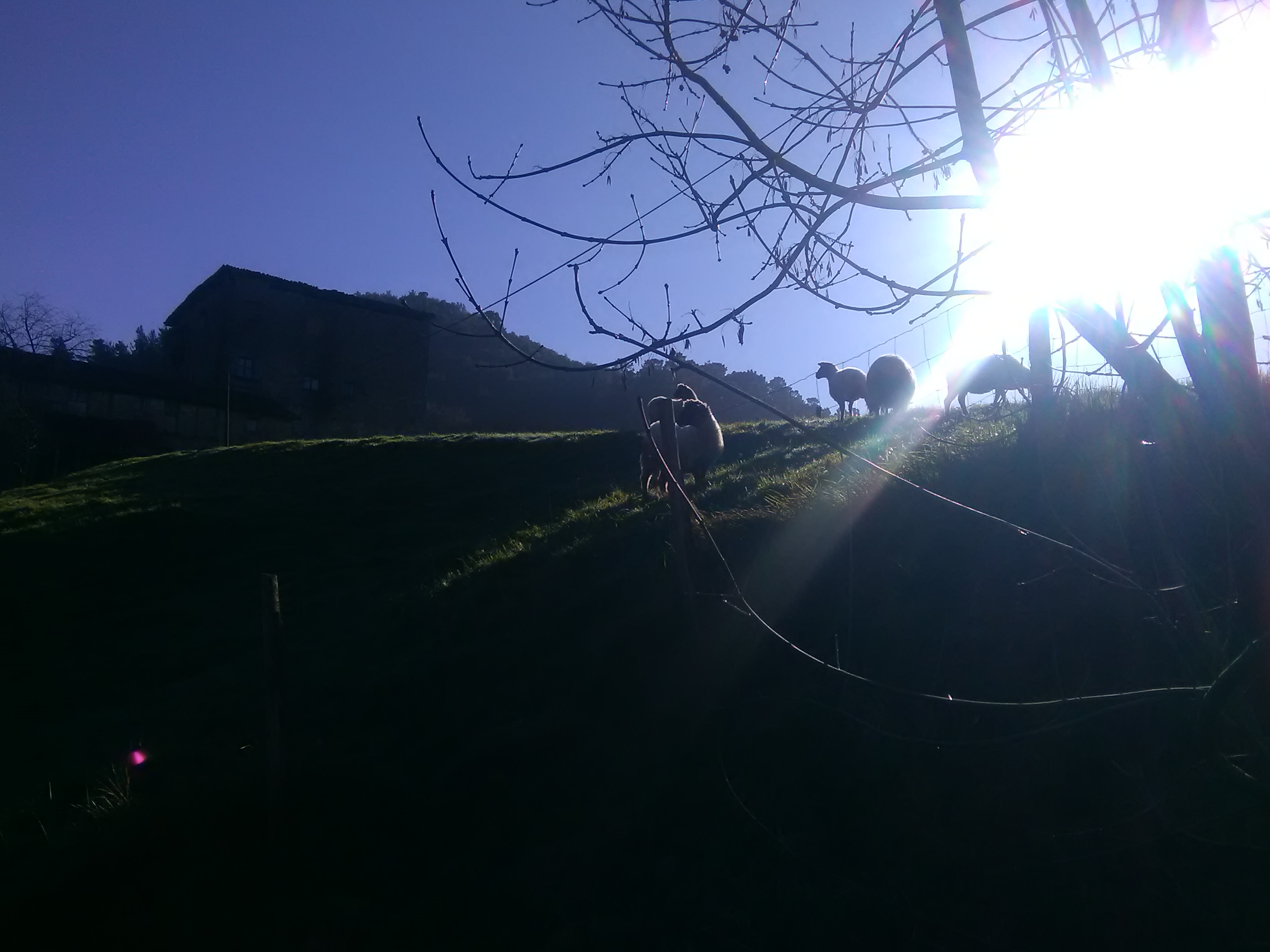 Barroeta dorretxea (Markina-Xemein). Gaztandegiko ardiak.